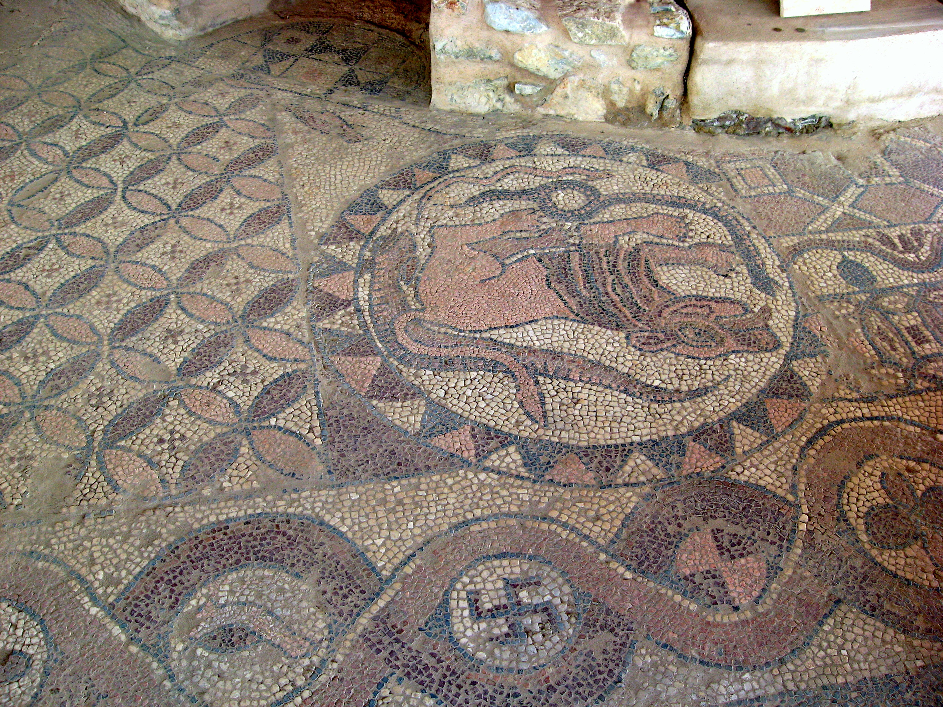 Свастика како дел од мозаиците во близина на црквата Св. Климент и Пантелејмон на Плаошник, Охрид.